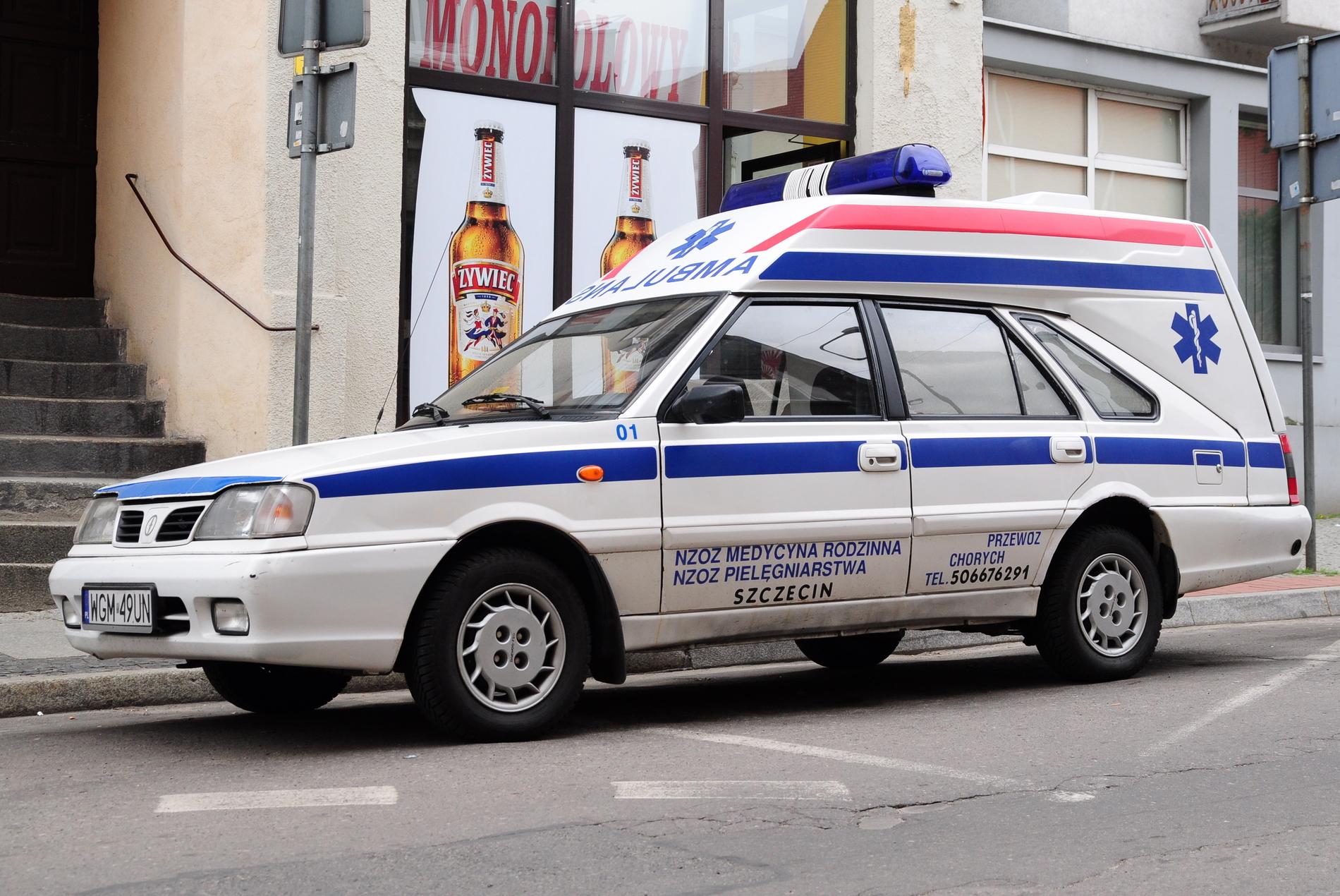 Polonez Ambulans 1,6 GLI ( Daewoo-FSO Cargo Plus ). Nadwozie adaptowane do funkcji sanitarki w Zakładzie Tapicerki Samochodowej w Grójcu.